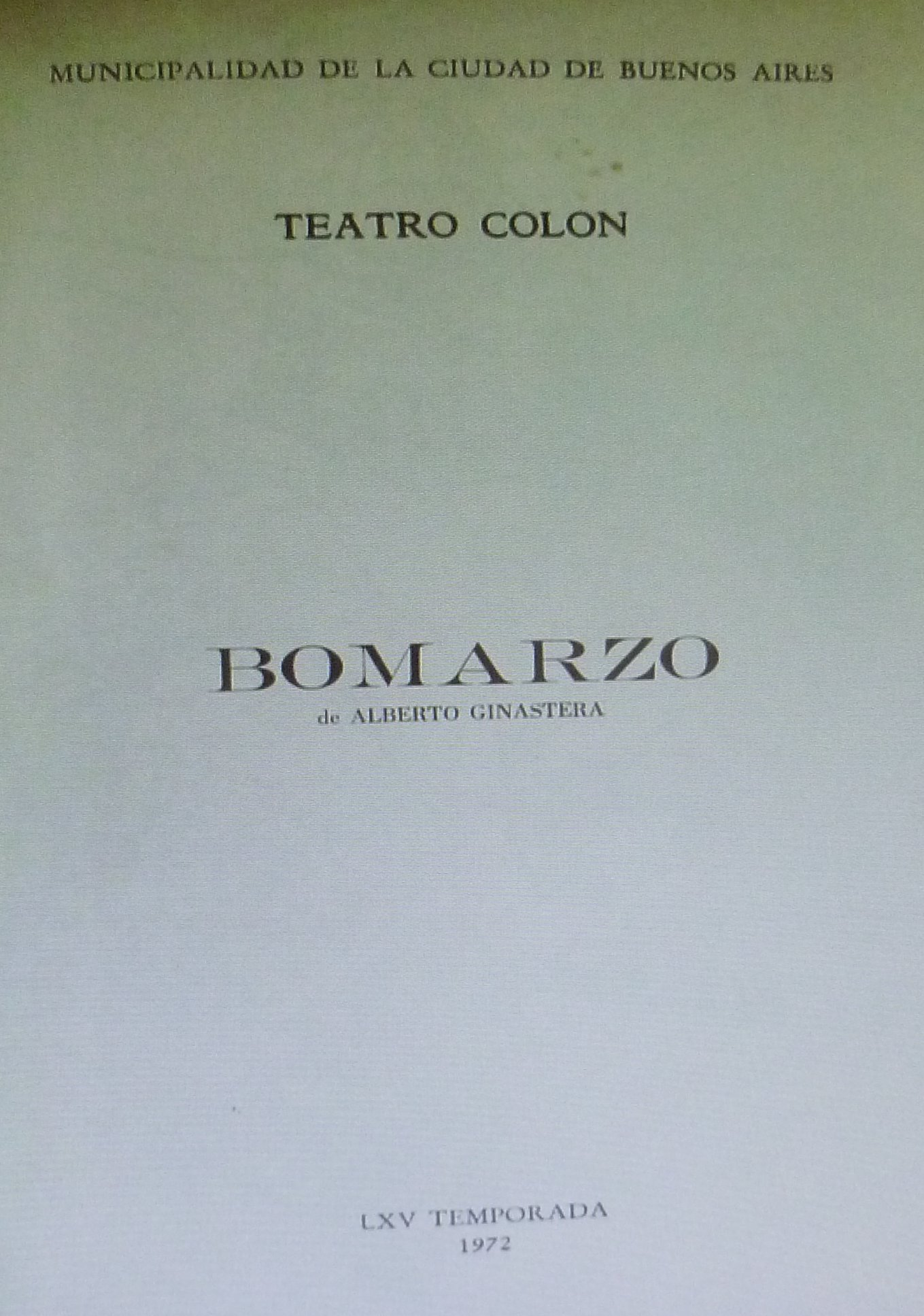 Programa de la ópera Bomerzo en el Teatro Colón 1972.